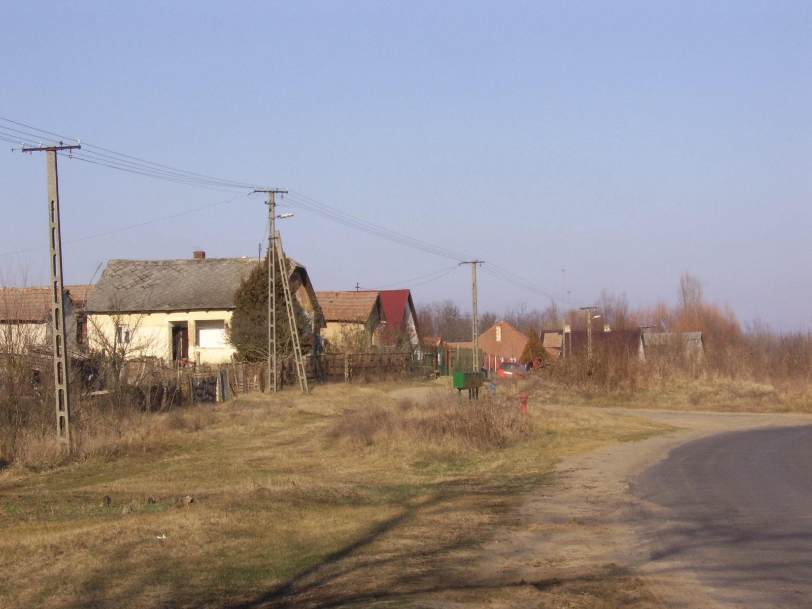 Petri tanya (Balkány)